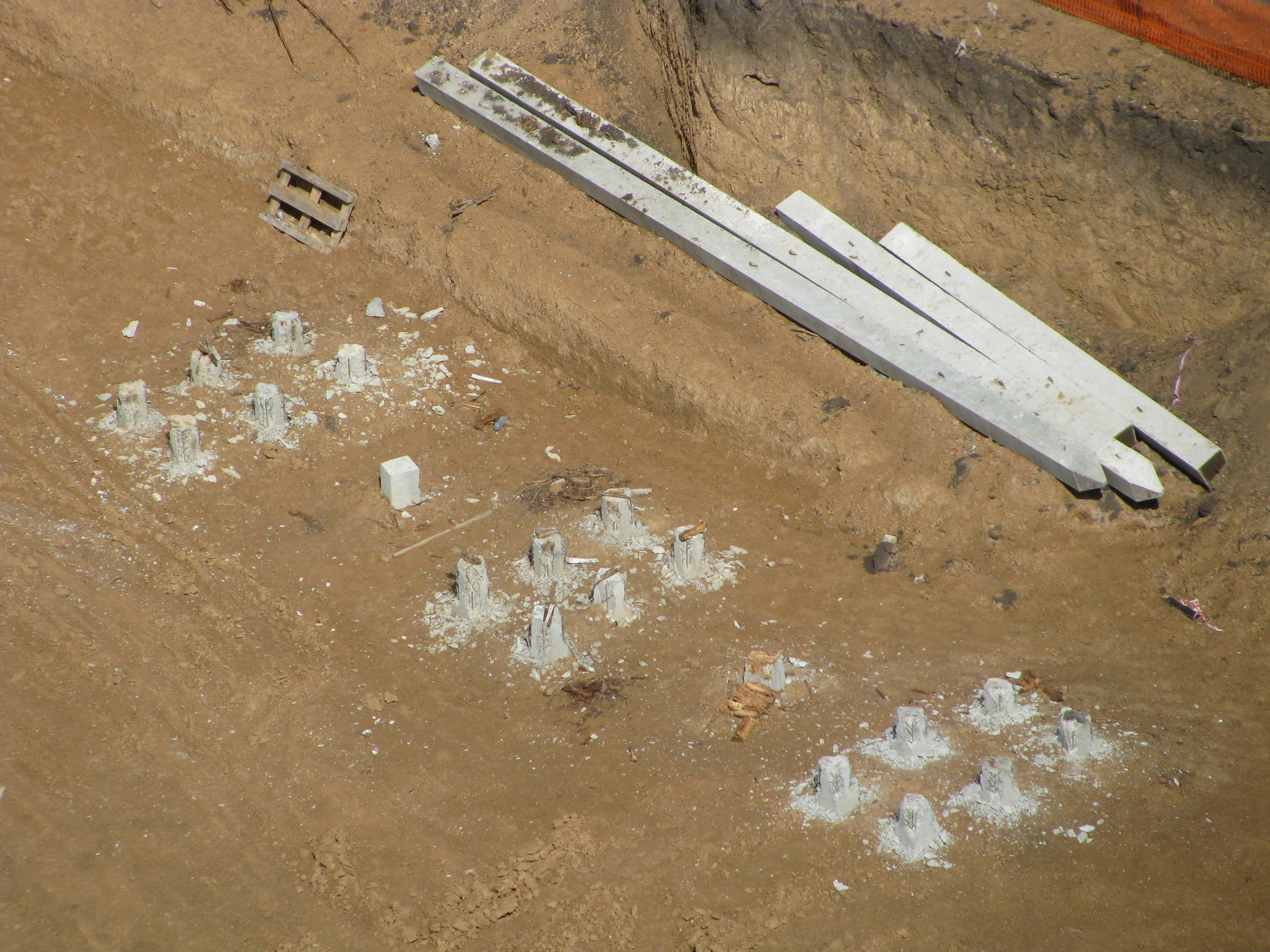 Сваи на строительной площадке